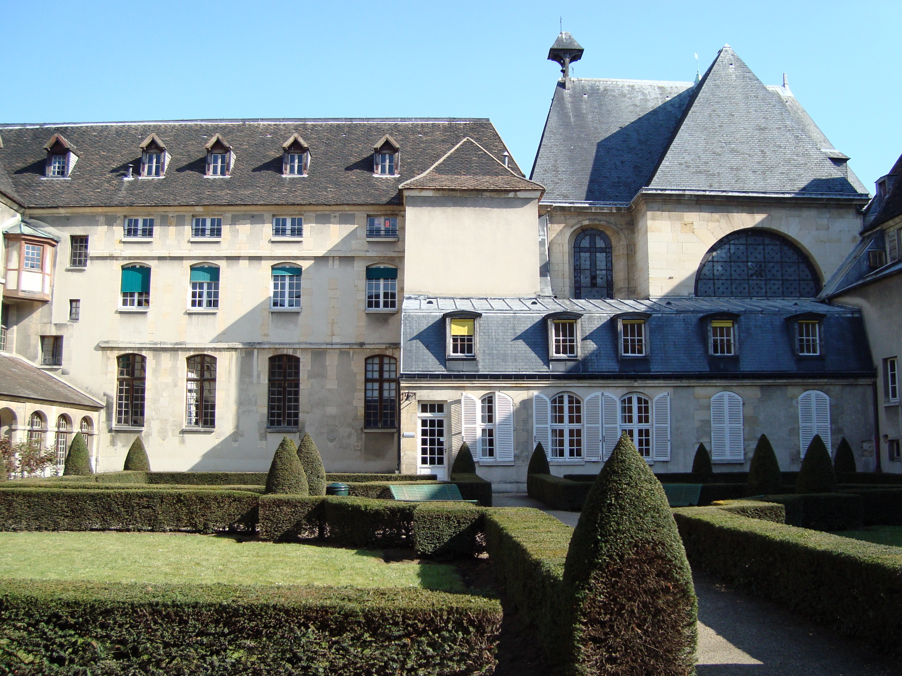 Cloitre de Port-Royal dans l'hopital Cochin à Paris